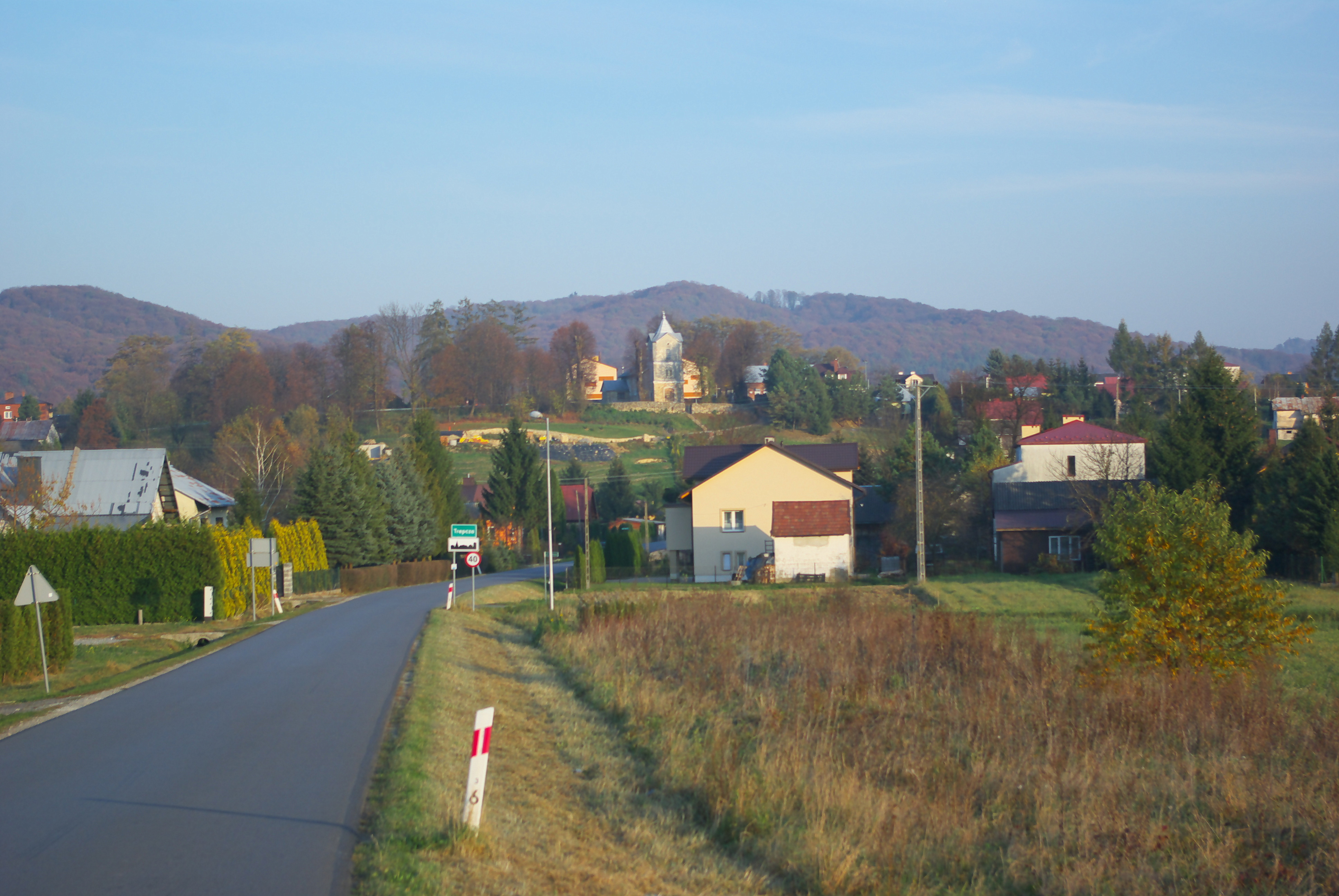 Trepcza (2018-10)